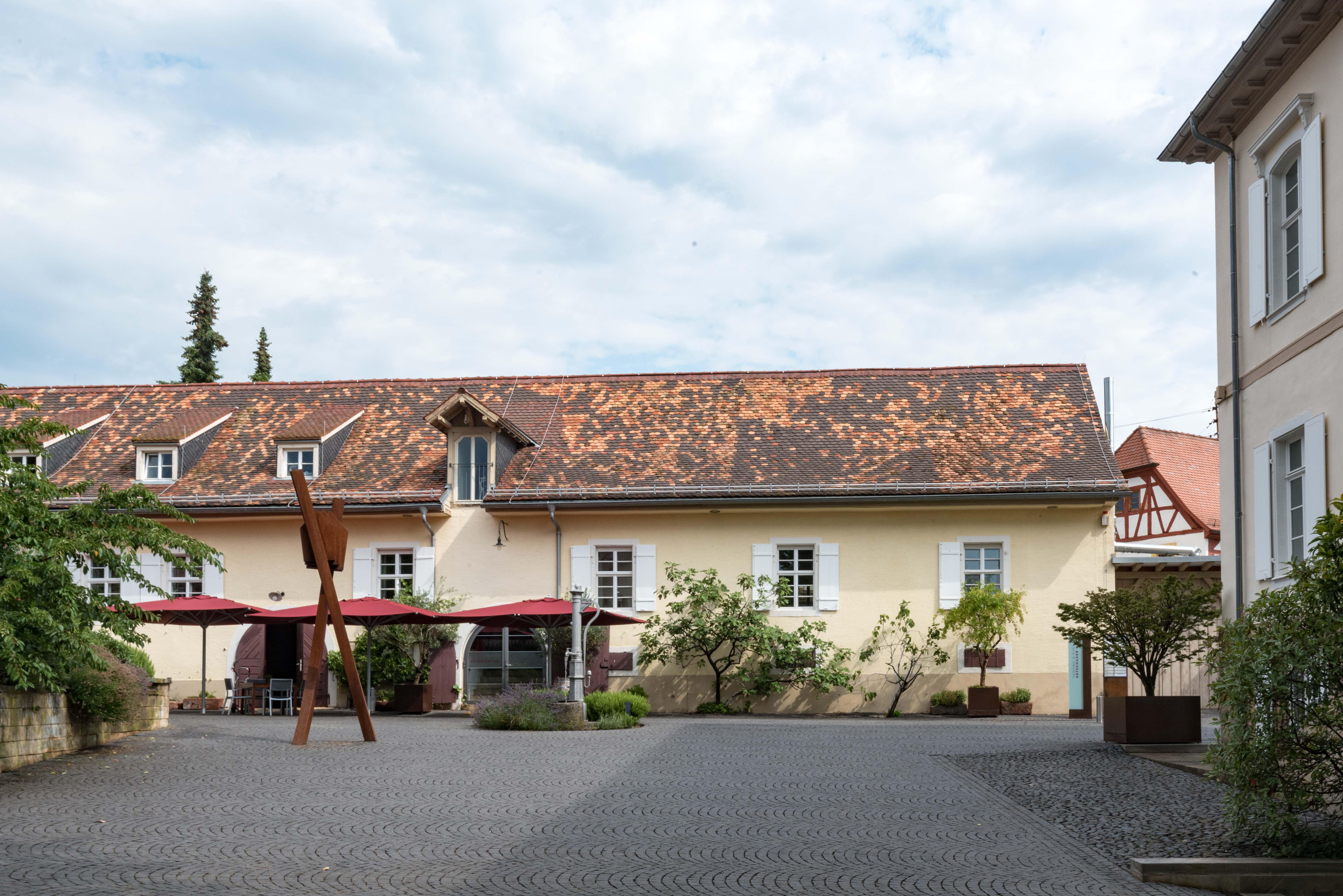 Deidesheim, Ketschauerhofstraße 1